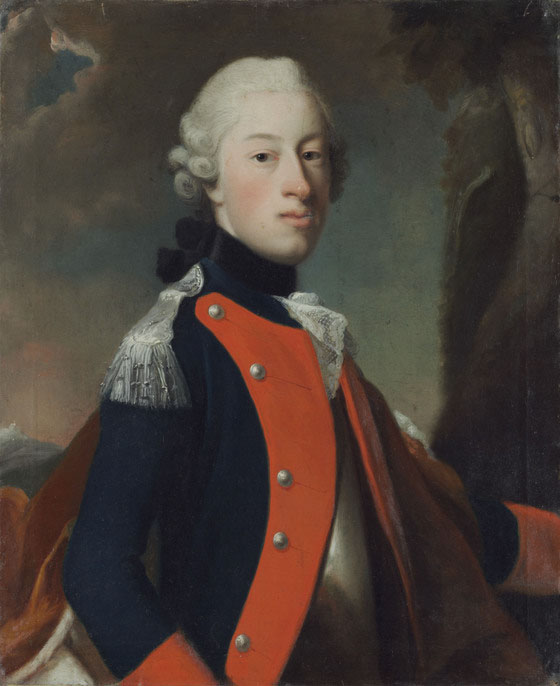 Adolf Prinz von Hessen-Philippsthal-Barchfeld (1743-1803)